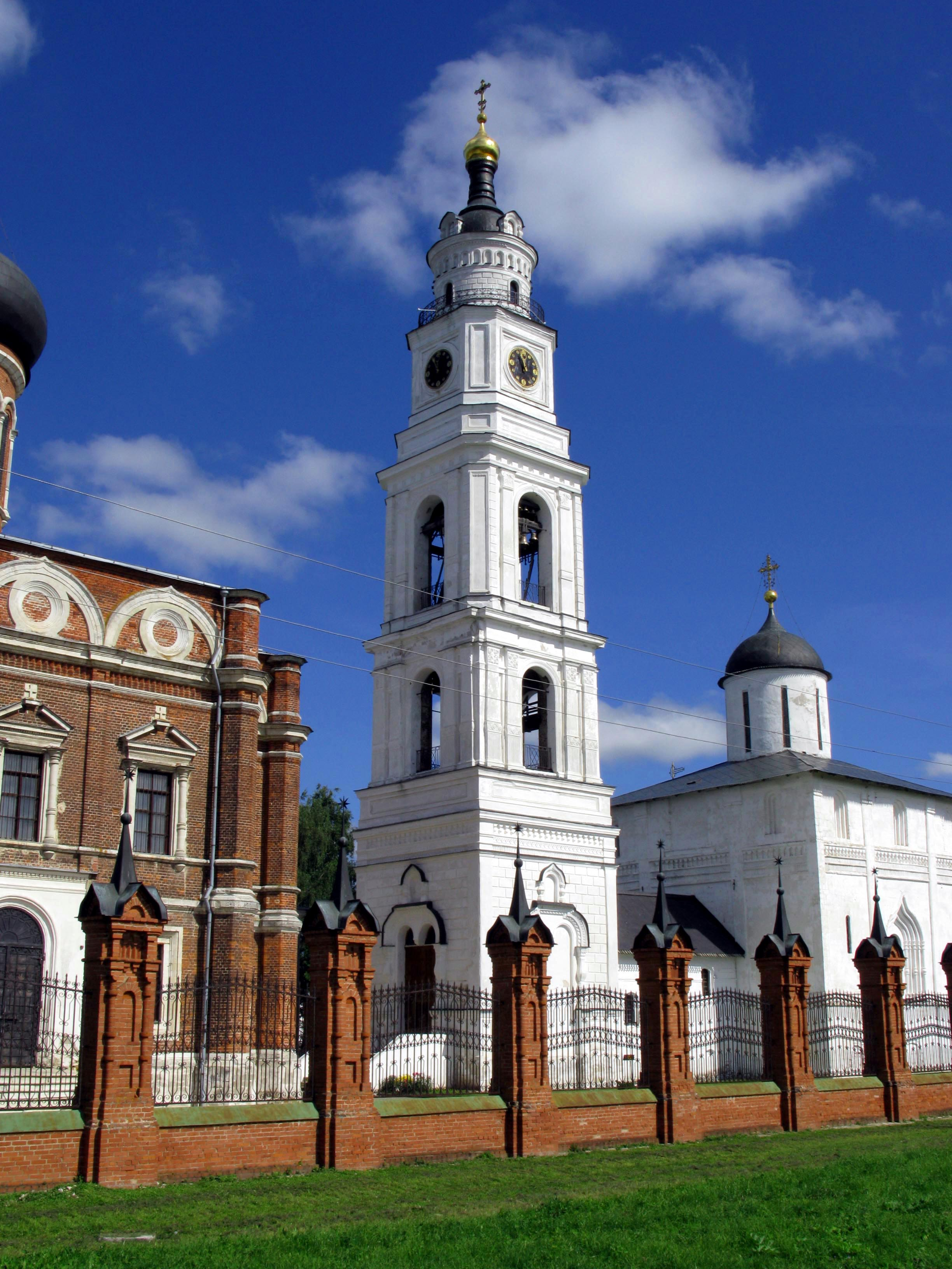 Собор Воскресения Христова (Волоколамск)